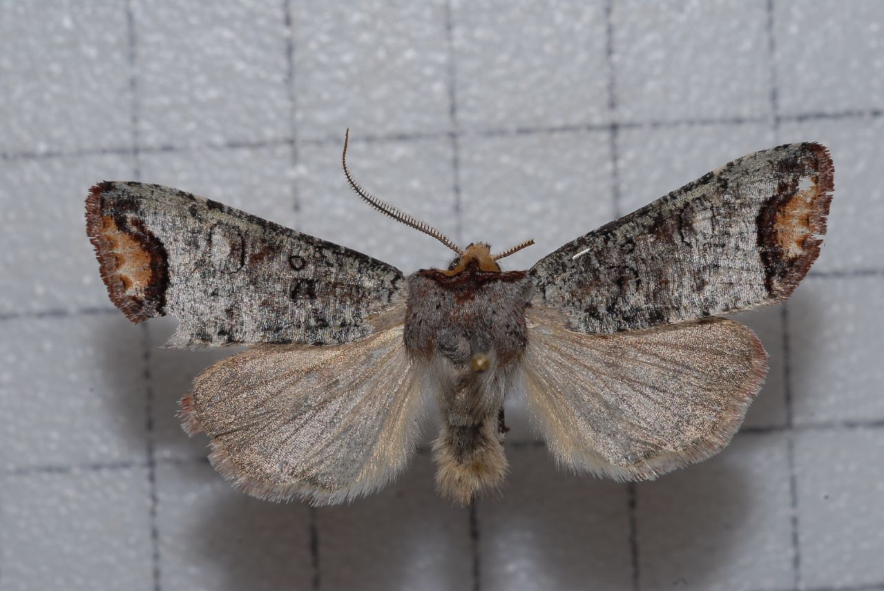 Pseudopanolis flavimacula (Wileman, 1912) 偽小眼夜蛾 鞍1:P.110,Pl.27-24